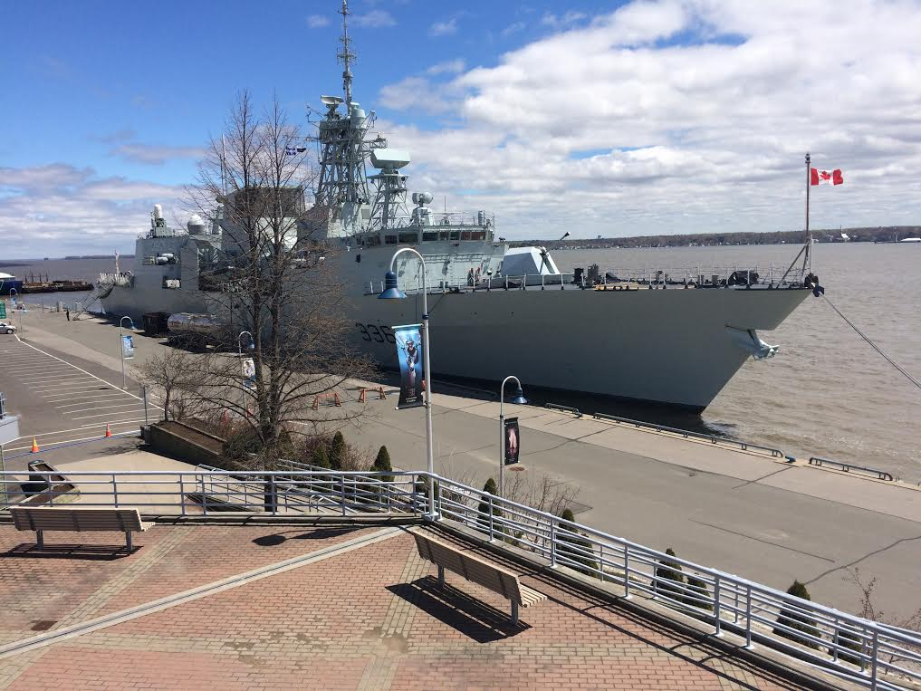 La frégate canadienne NCSM Montréal (FFH 336) au port de Trois-Rivières le 12 mai 2017.